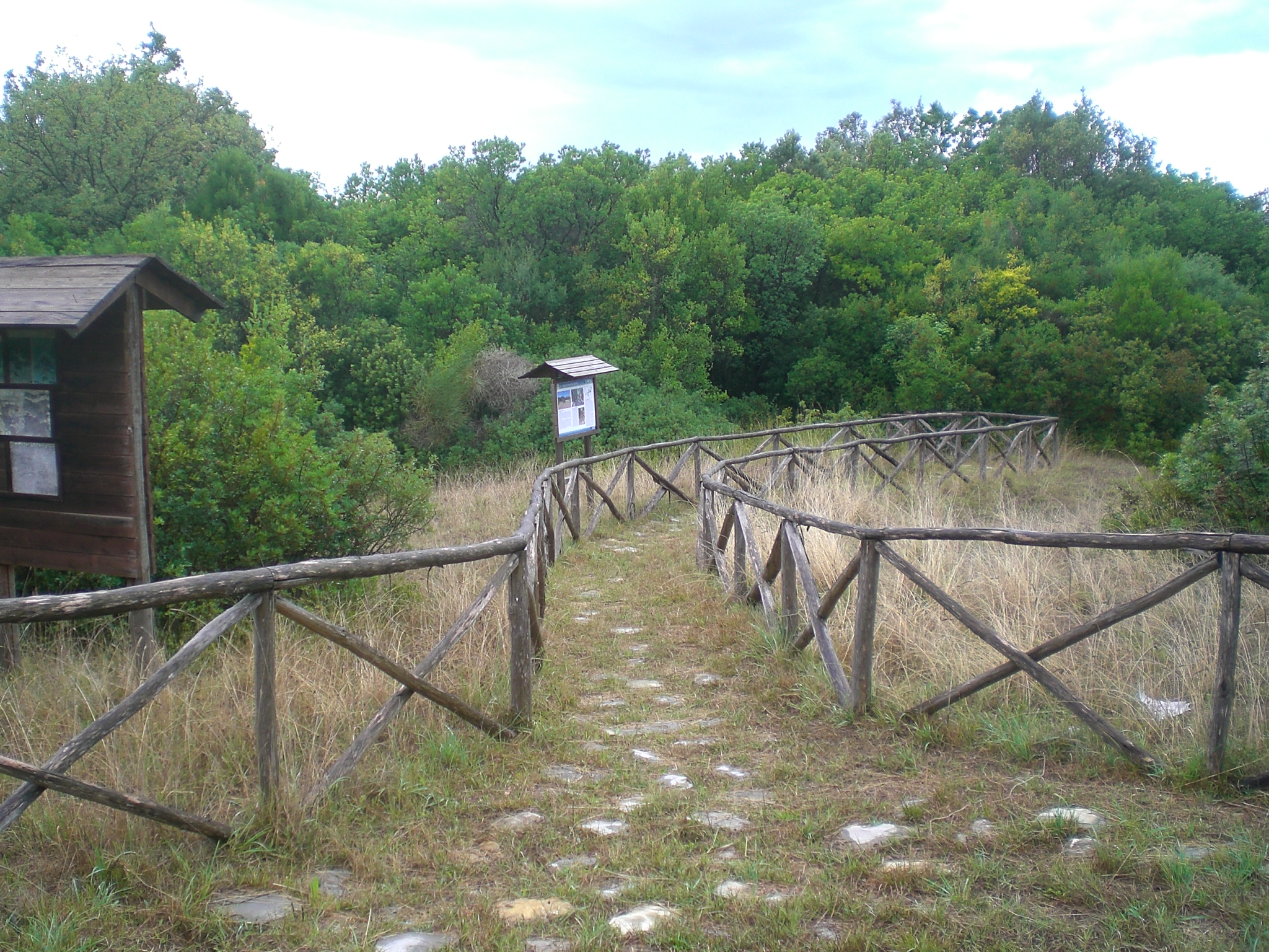 Oasi naturale Bosco Camerine This is a photo of a monument which is part of cultural heritage of Italy. The authorisation for taking photos of this object was provided by the World Wide Fund for Nature Italy.